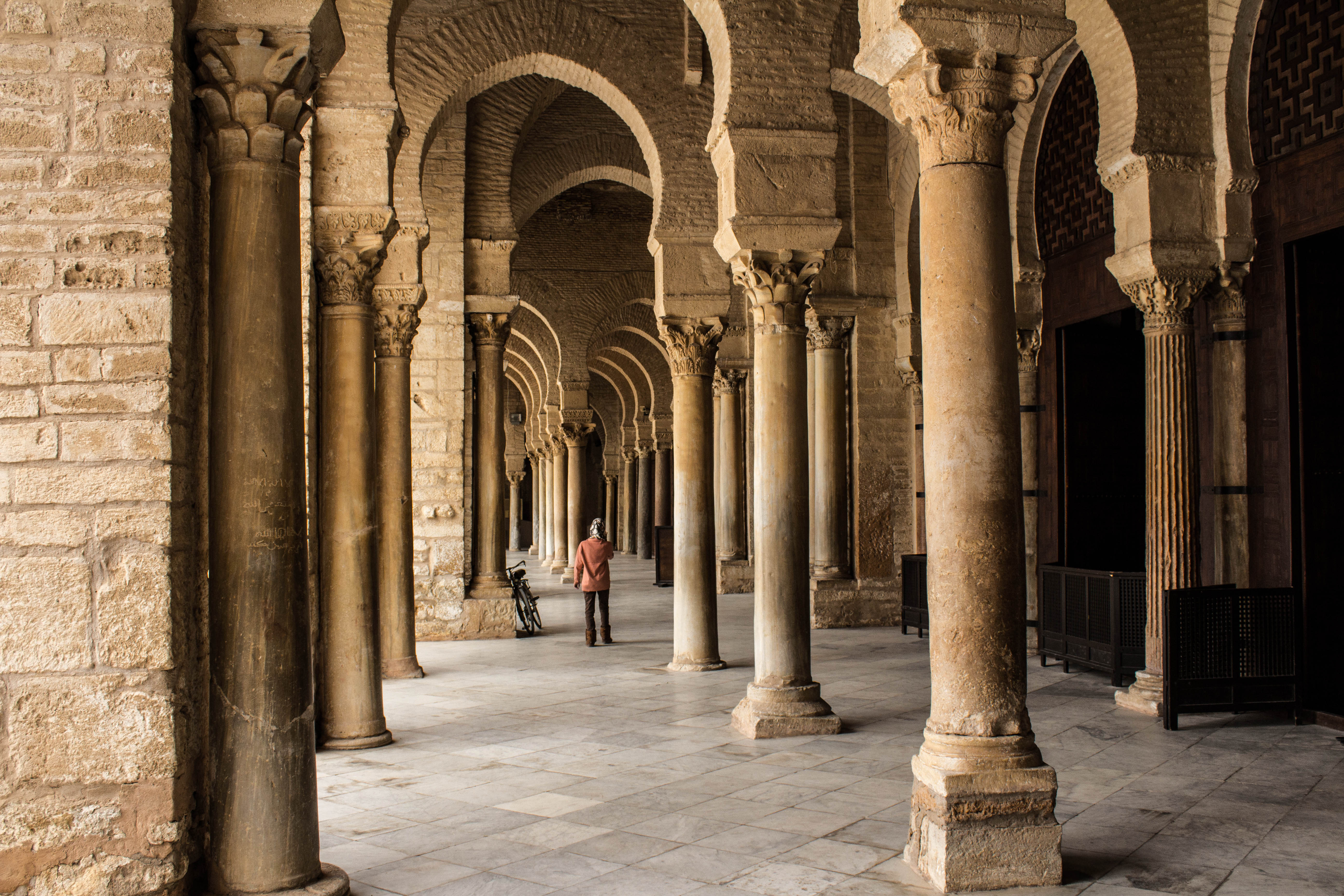 Grande Mosquée (Sidi Okba), Kairouan. Vue intérieure du portique sud de la cour, en avant de la salle de prière.